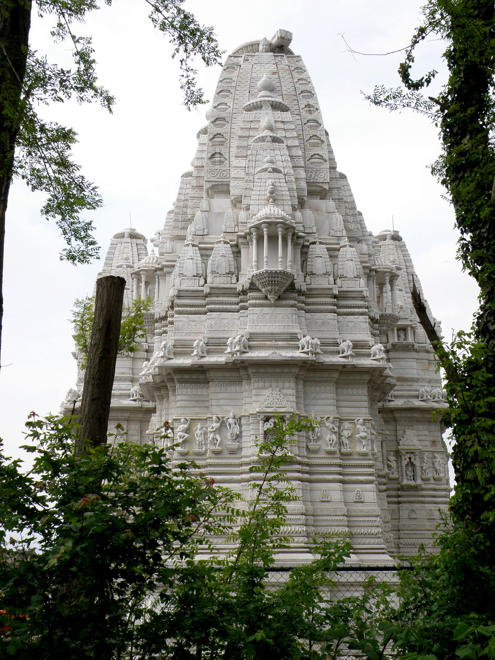 Antwerpen, district Wilrijk. Jaïn-tempel aan de Laarstraat.